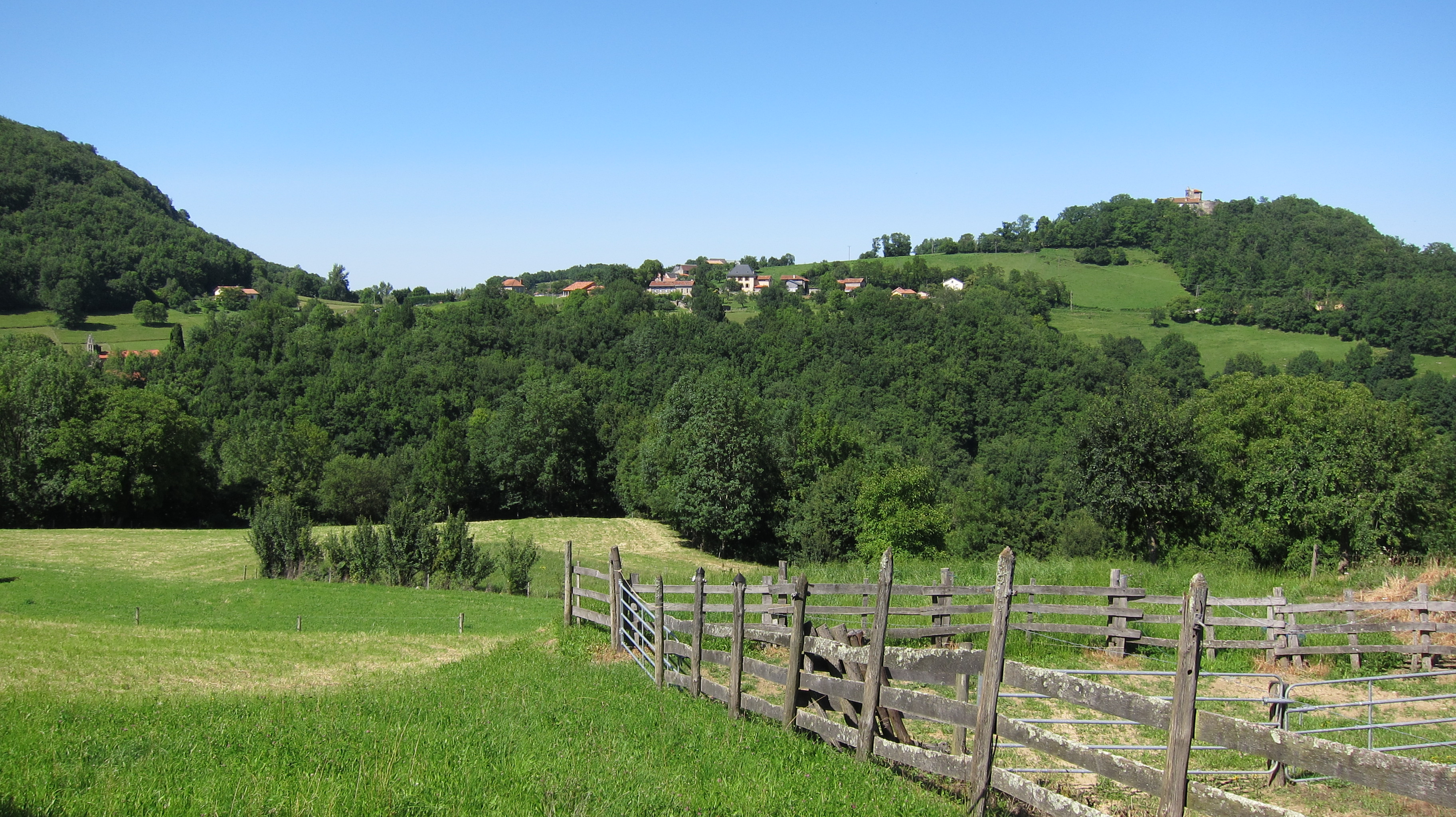 Montégut-en-Couserans (Ariège, France) : Le village vu depuis le hameau d'Ussau. En bas à gauche on distingue l'église et en haut sur la droite, le château.